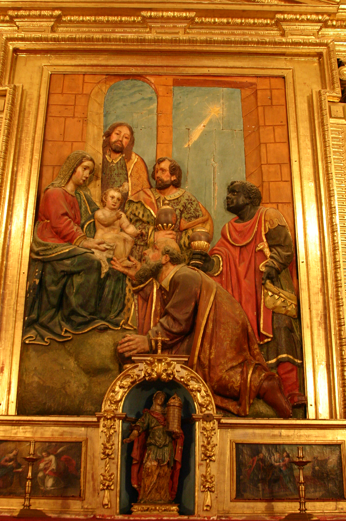 Adoração dos Magos